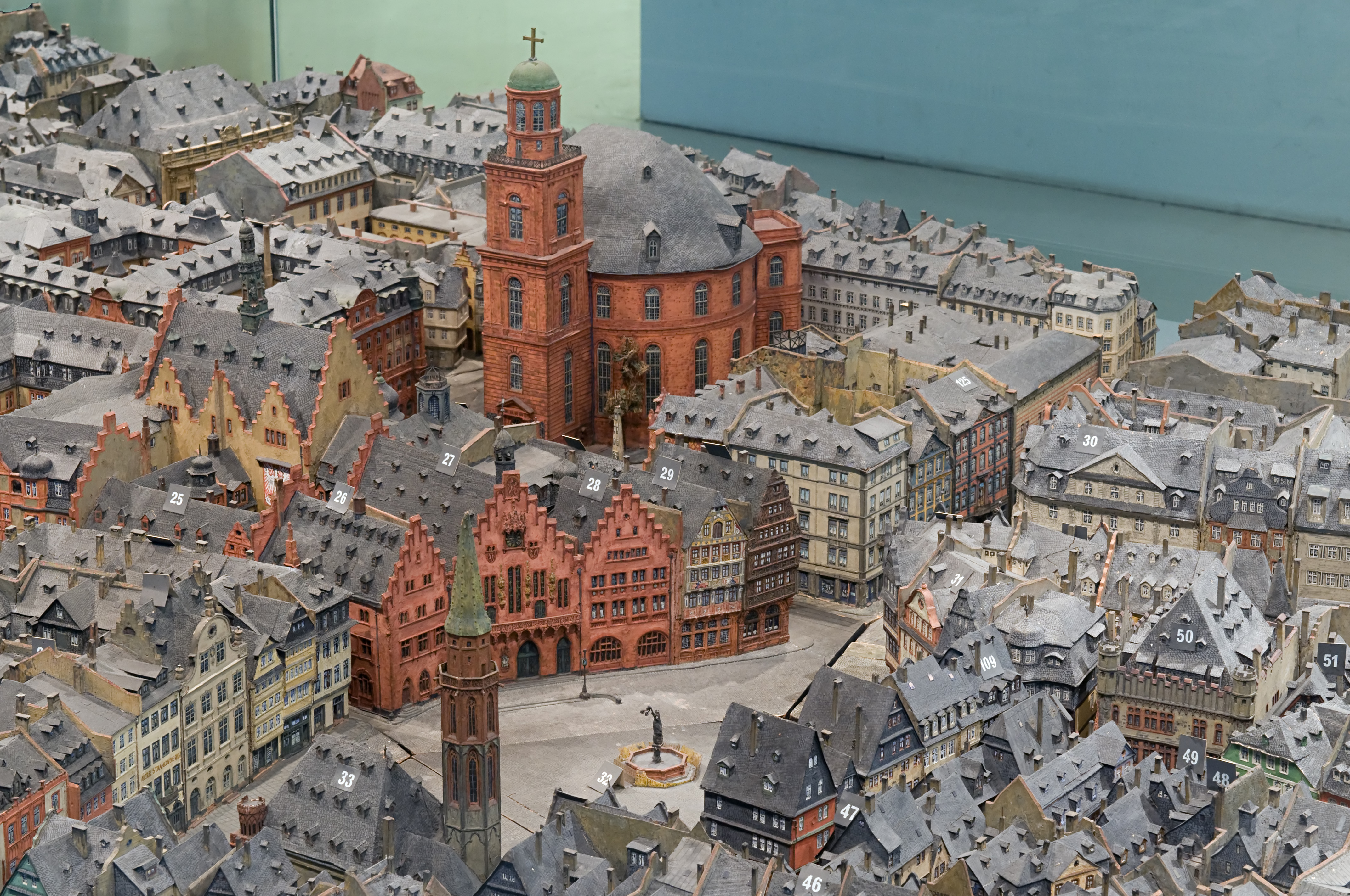 Historisches Museum Frankfurt am Main Altstadtmodell der Brüder Treuner Römerberg und Paulskirche